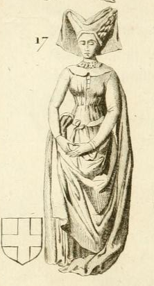 Marie of Savoy, Duchess of Milan